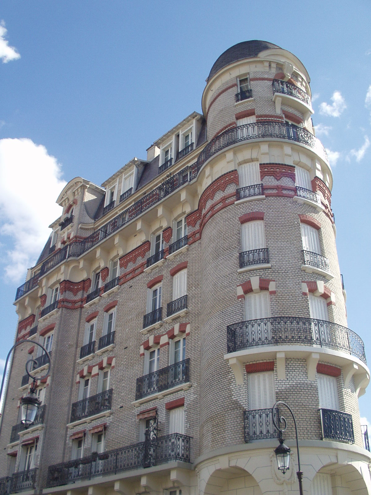 Immeuble rue Monge à Puteaux. Auteur : Olivier Passalacqua